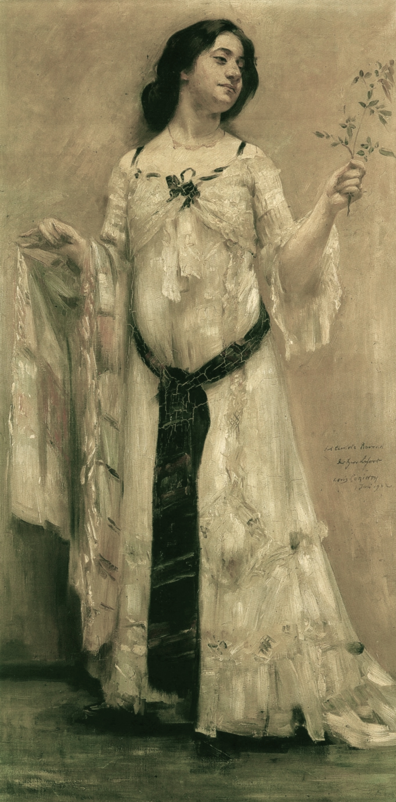 Bildnis seiner Schülerin Charlotte Behrend